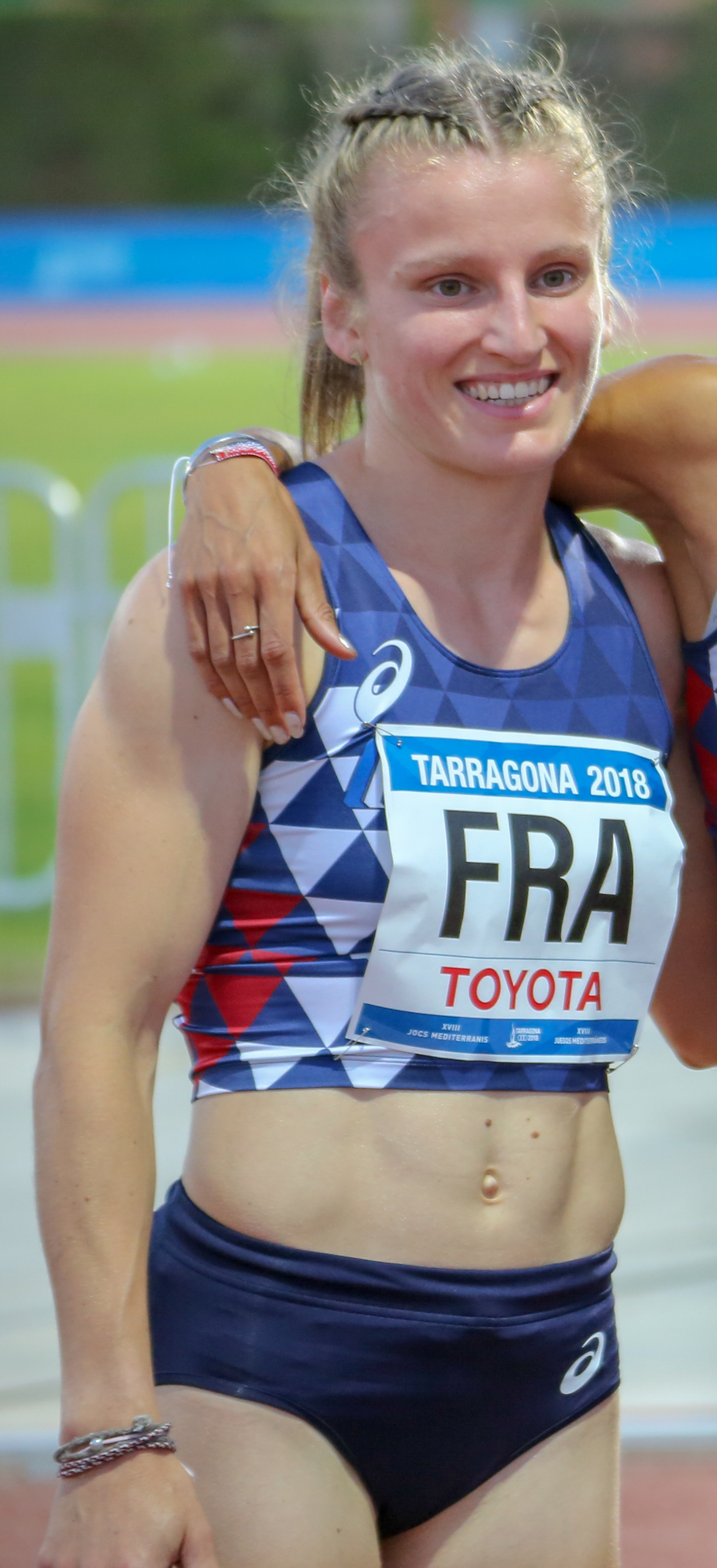 Francia en los relevos 4x400 en los Juegos del Mediterráneo 2018 (Amandine Brossier, Agnès Raharolahy, Cynthia Anaïs, Elea-Mariama Diarra)